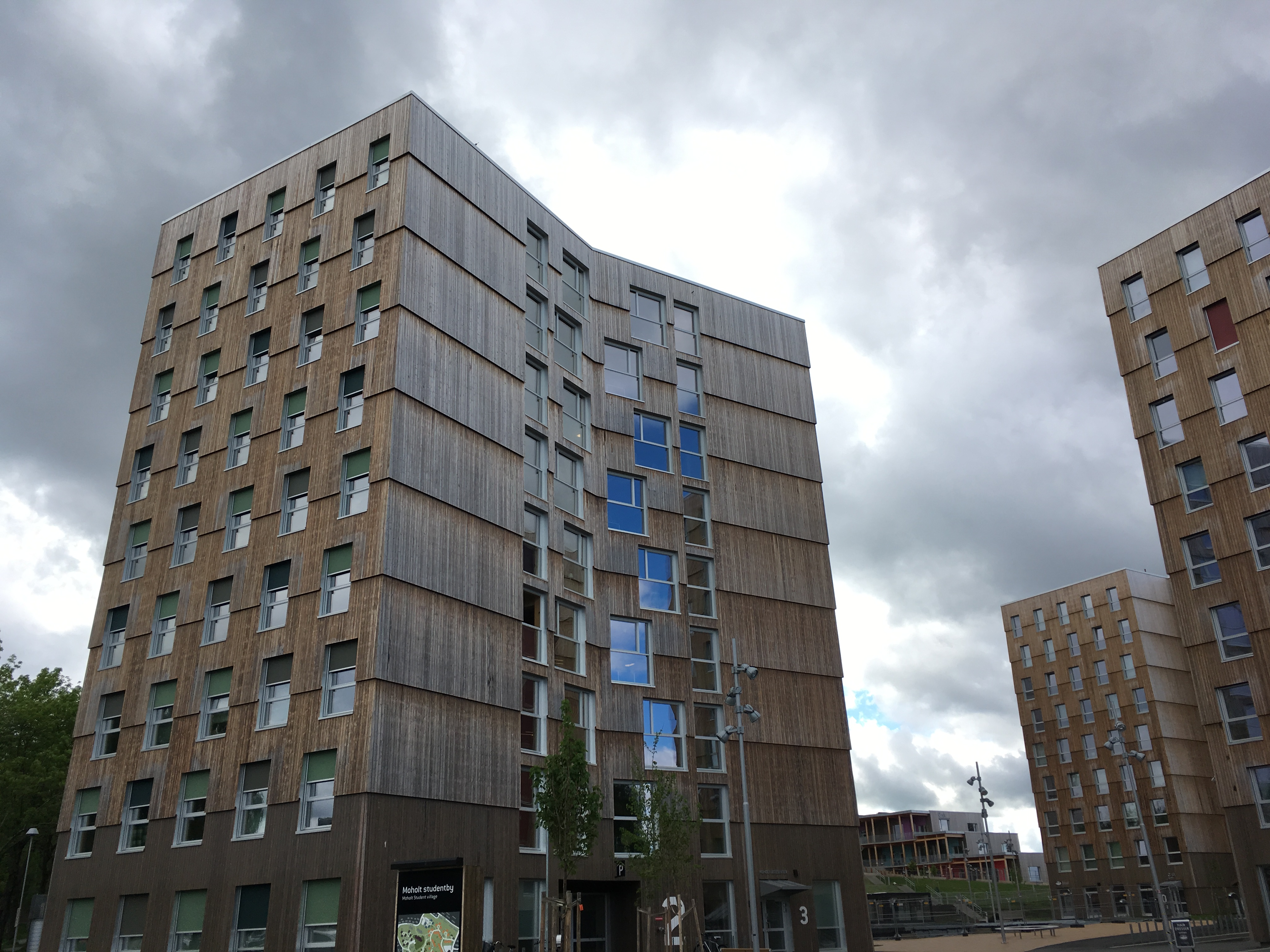 Moholt 50/50 Utvidelse av Moholt studentby i Trondheim. Massivtre. Arkitekt: MDH. Vinner av Trondheim kommunes byggeskikkpris 2017